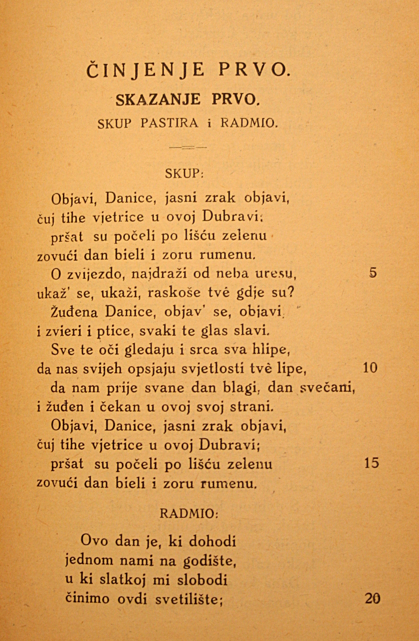 Dubravka, Ivan Gundulić